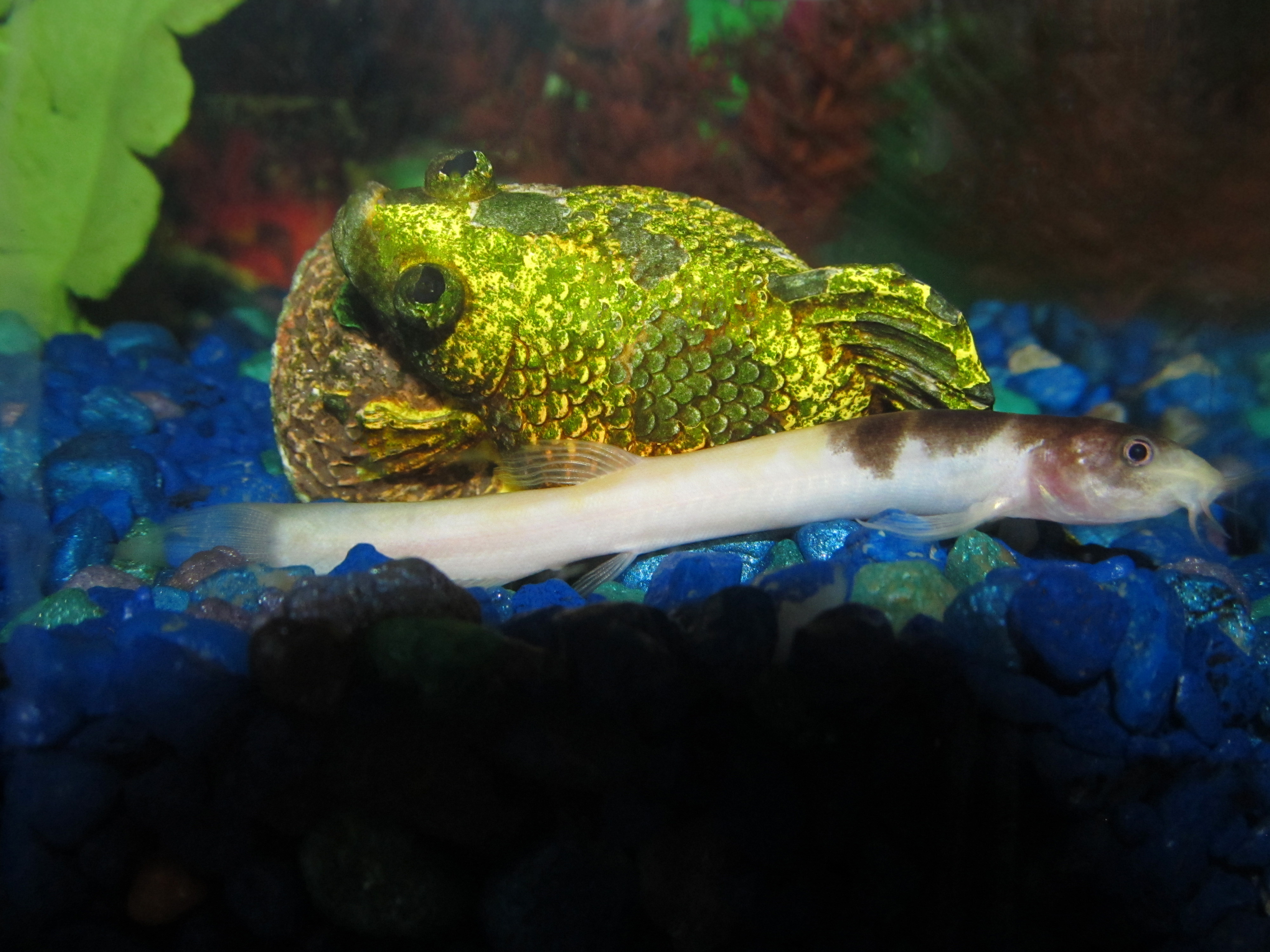 A Dojo loach, Misgurnus anguillicaudatus